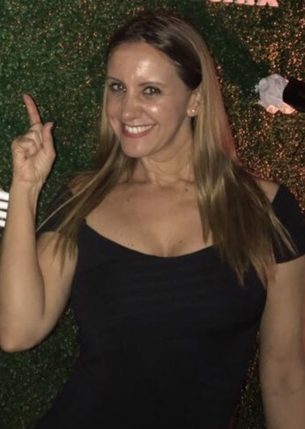 Arancha en la presentación de Netflix en México.